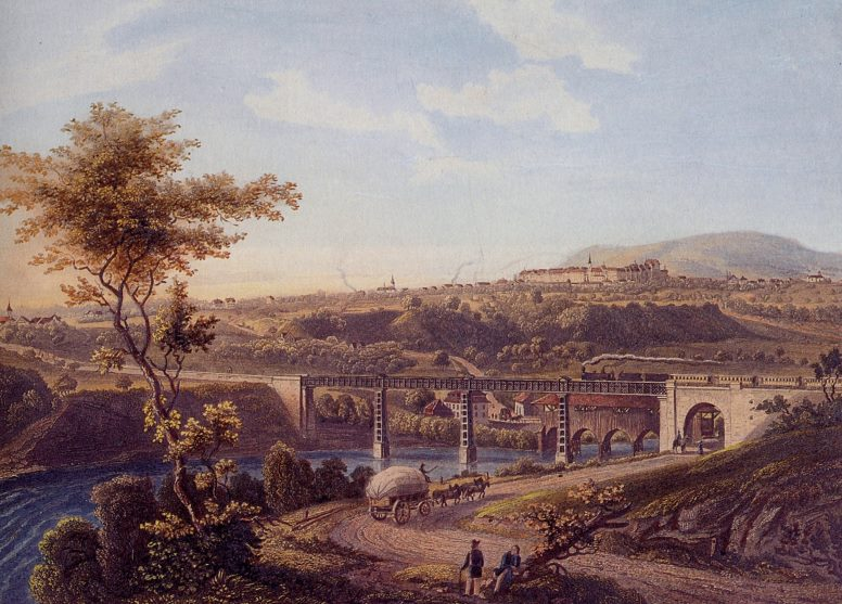 Eisenbahnbrücke über die Thur bei Schwarzenbach. 1926 wurde die Brücke durch eine stärkere, doppelspurige Steinbogenbrücke ersetzt. Von der Eisengitterbrücke sind noch Überreste der Tuffstein-Widerlager vorhanden.